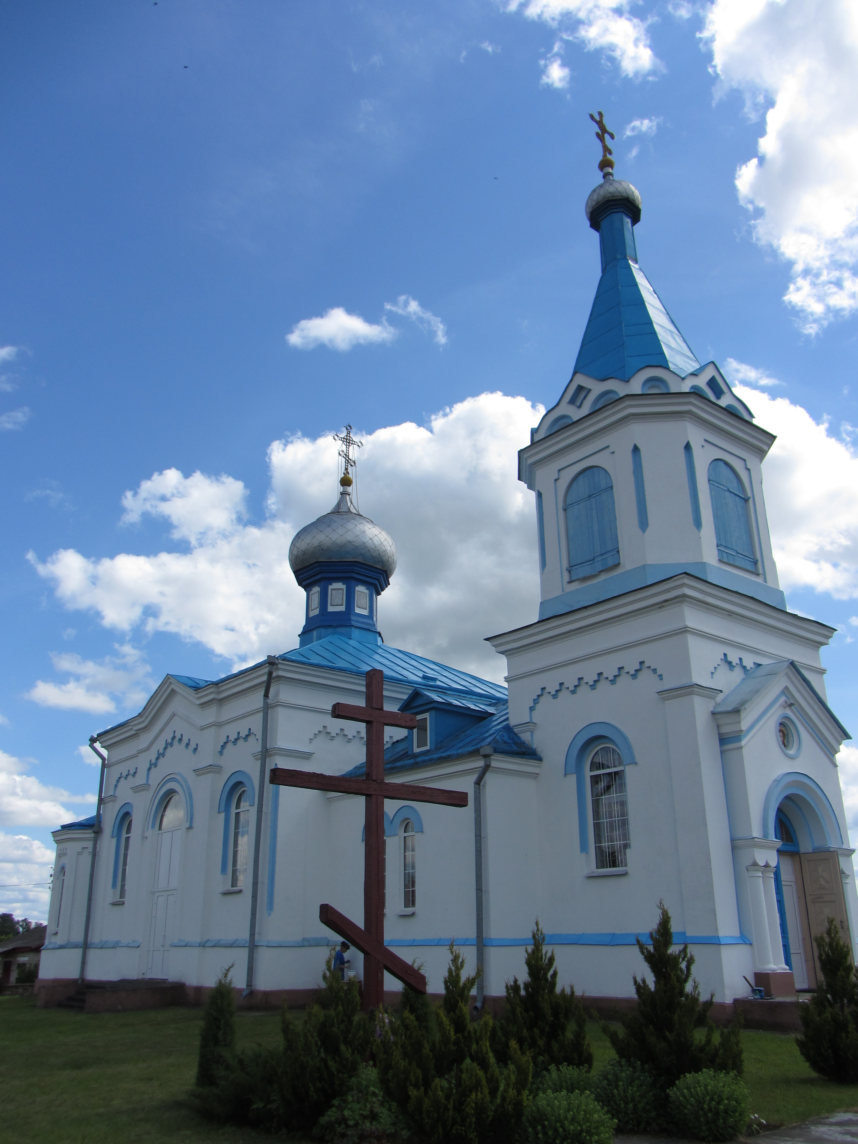 Беларуская (тарашкевіца): Царква Сьвятога Георгія ў Гальшанах